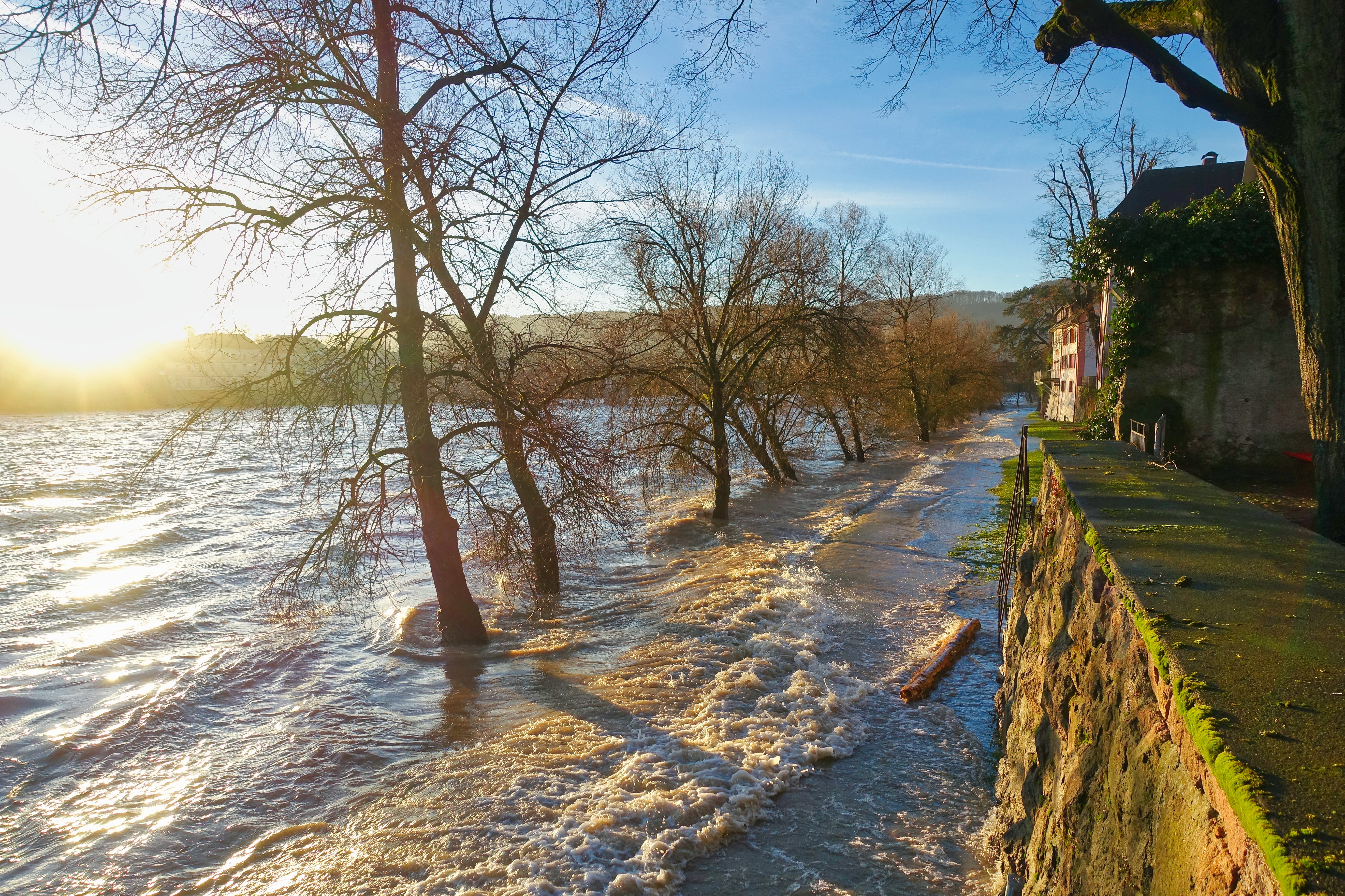 Bad Säckingen Rheinhochwasser Januar 2018